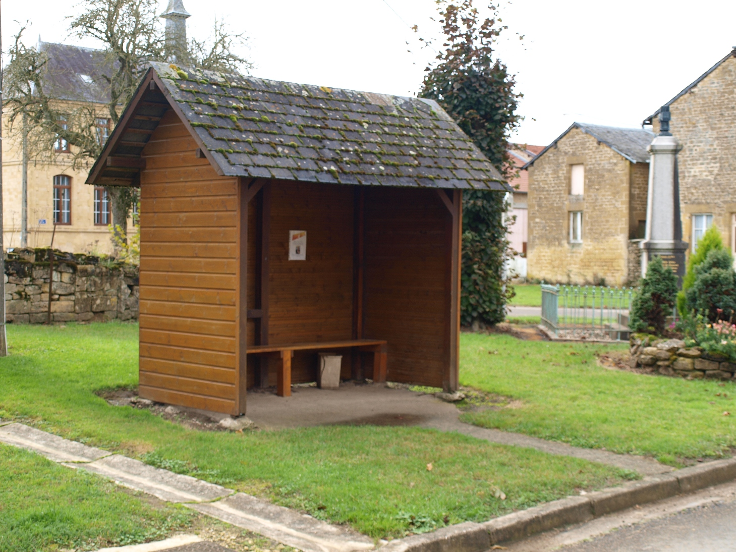 Authe (Ardennes, France) ; abribus